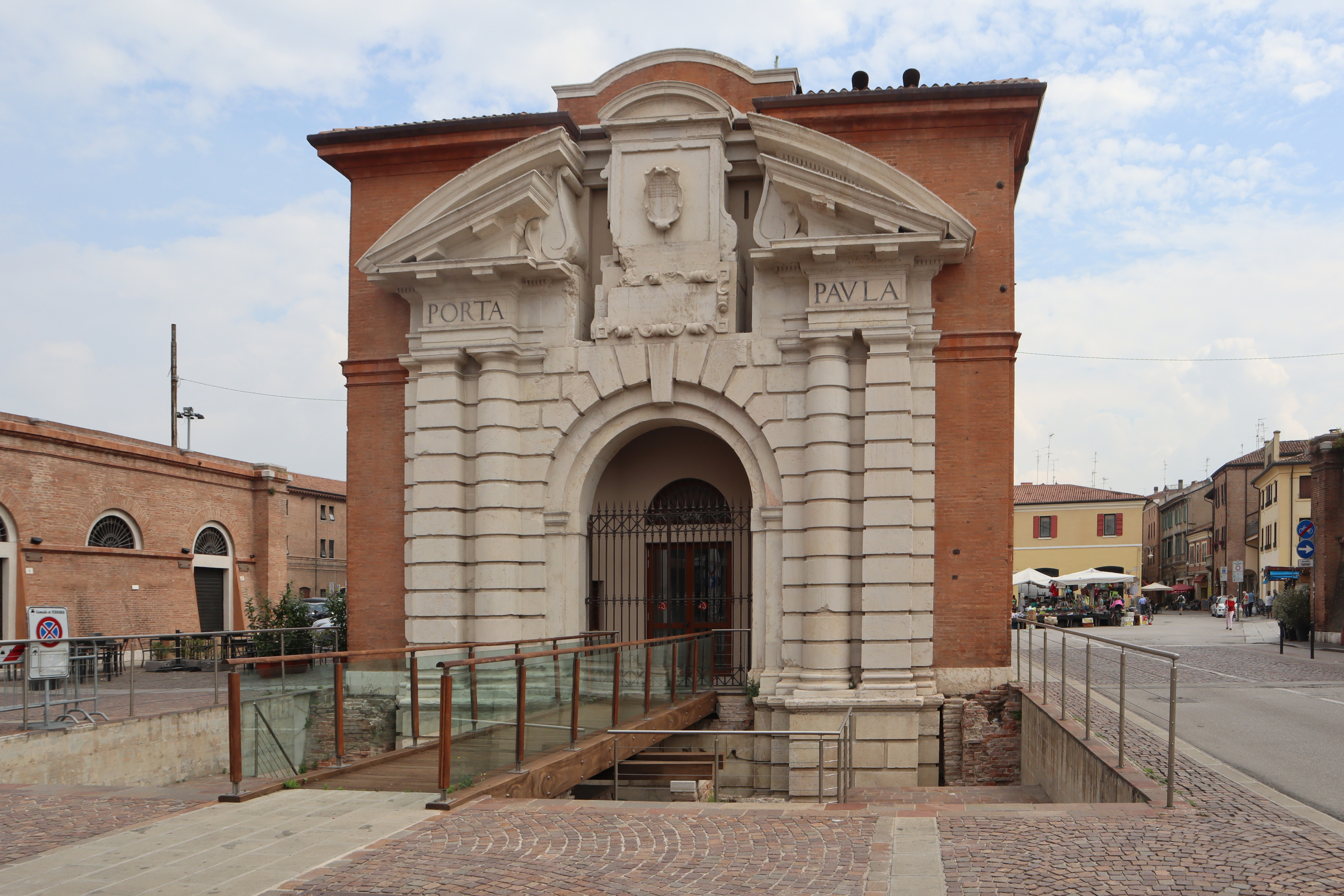 Porta Paola a Ferrara. Prospetto verso via Bologna